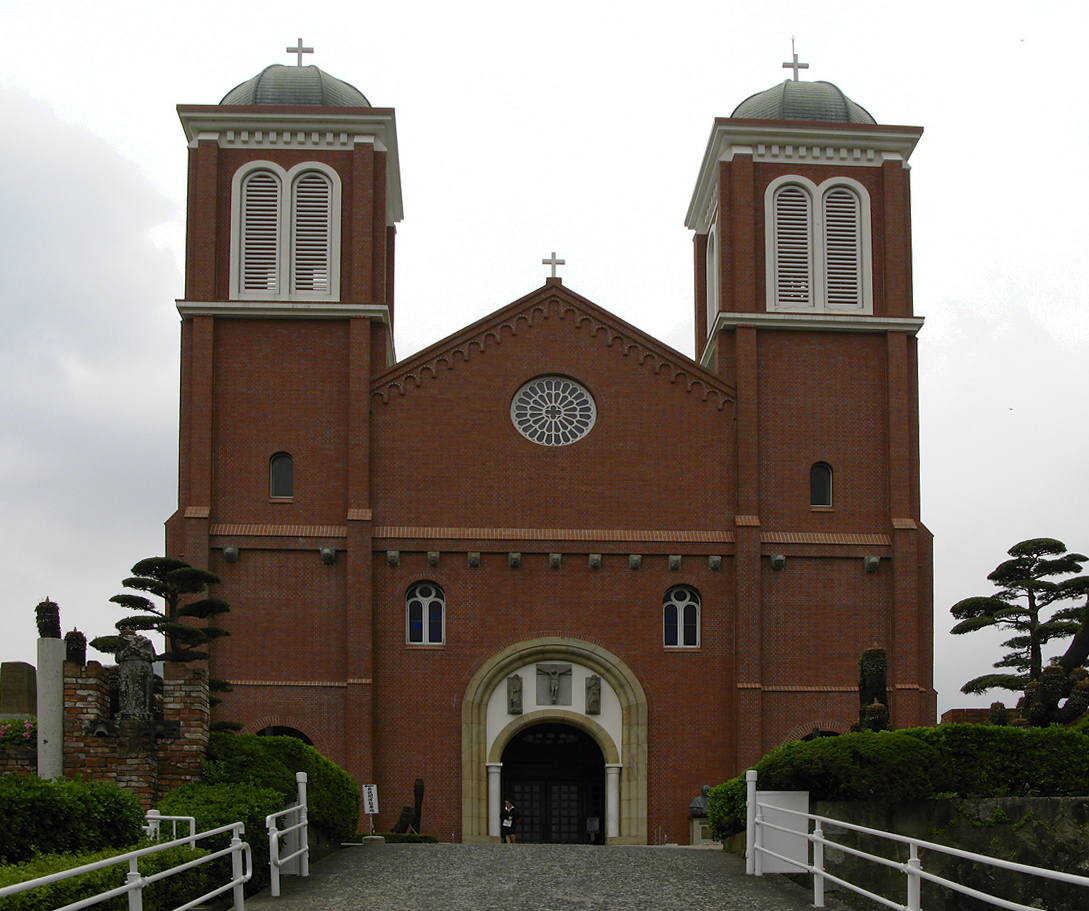 Urakami Cathedral in Nagasaki, Japan